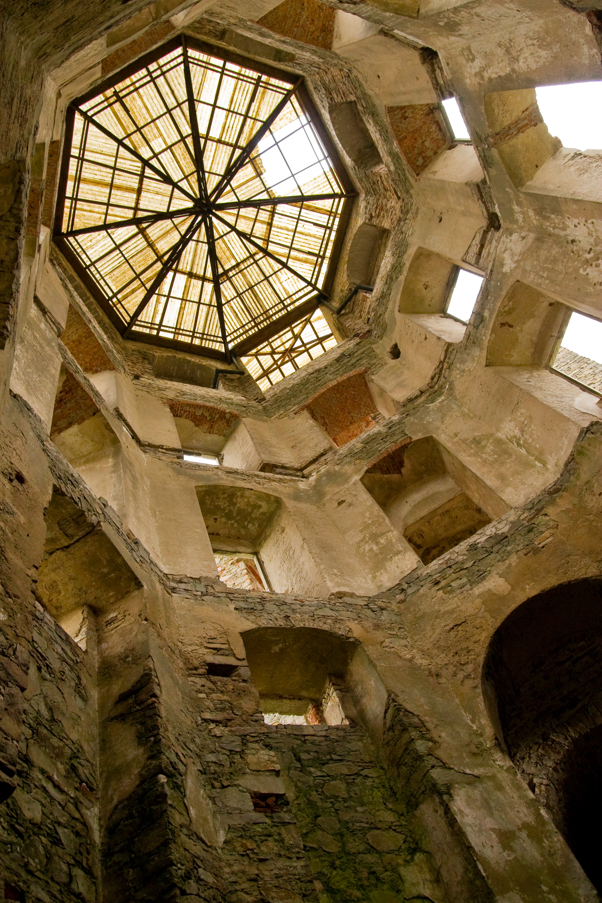 Krzyżtopór, Baszta